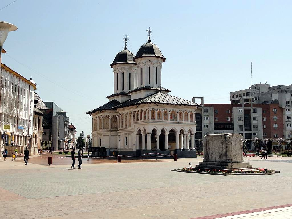 Biserica "Sf. Voievozi" din municipiul Târgu Jiu, Piața Victoriei, anii 1748-1764